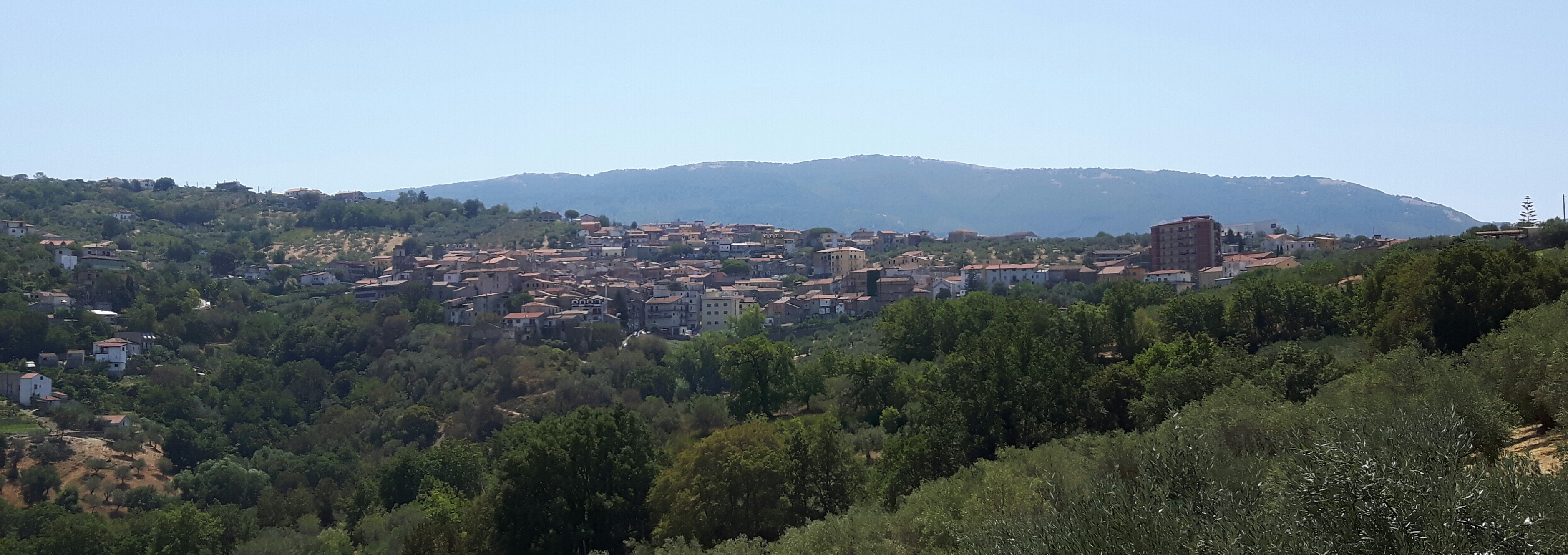 Il centro storico di Albanella, ripreso da nord, che in questa foto ne fa apprezzare la sua ubicazione tutta concentrata sul versante nord della collina, per non essere visibili dal mare. Fino agli inizi del novecento l'unica struttura visibile dalla piana di Paestum era il Santuario di Santa Sofia.